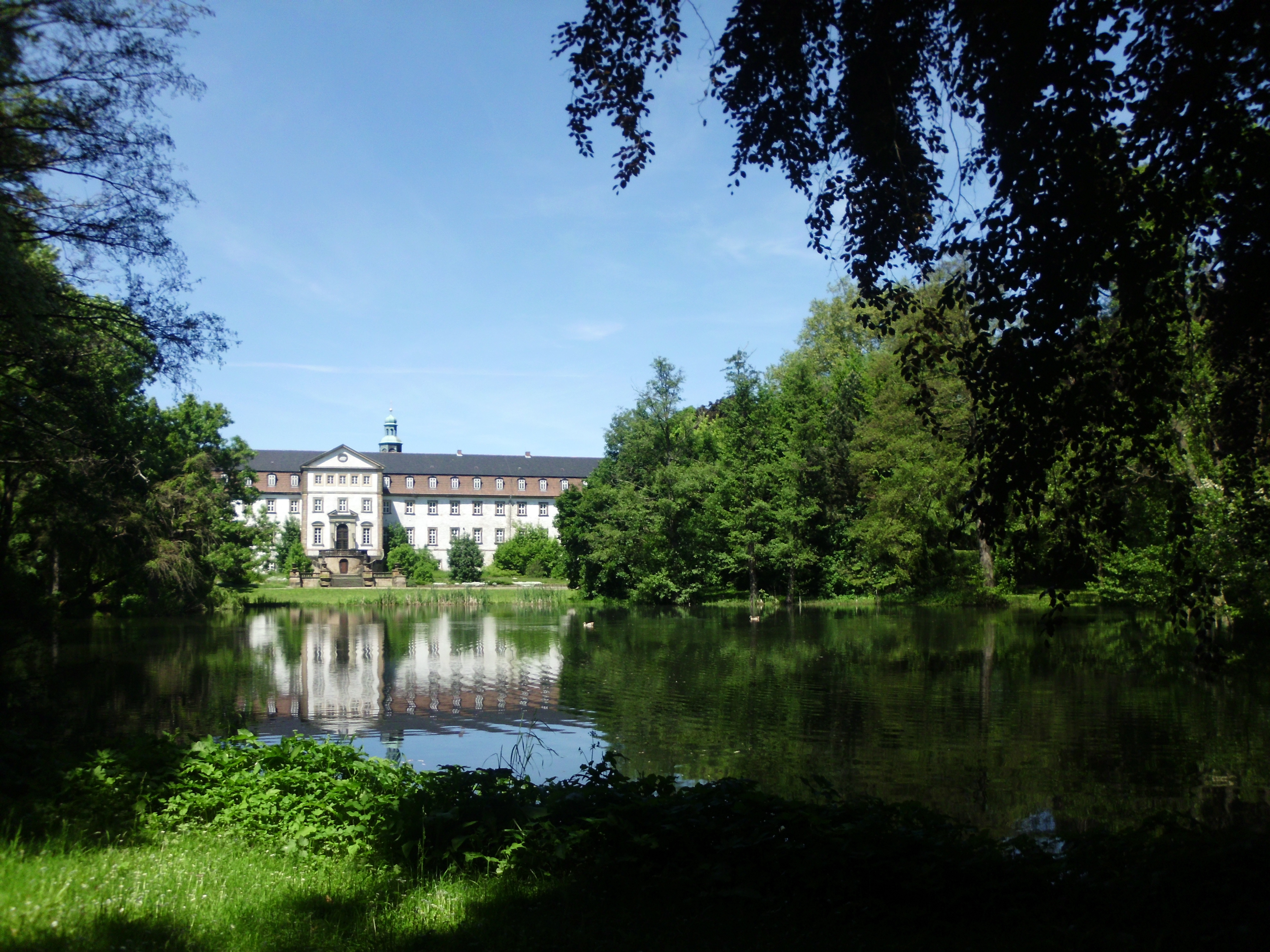 Blick über einen der Schlossteiche zum Schloss Ringelheim